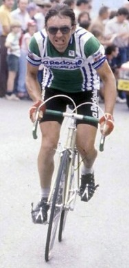 Mariano Martinez sur le Tour de France le 14 07 1980 entre Serre Chevalier et Morzine